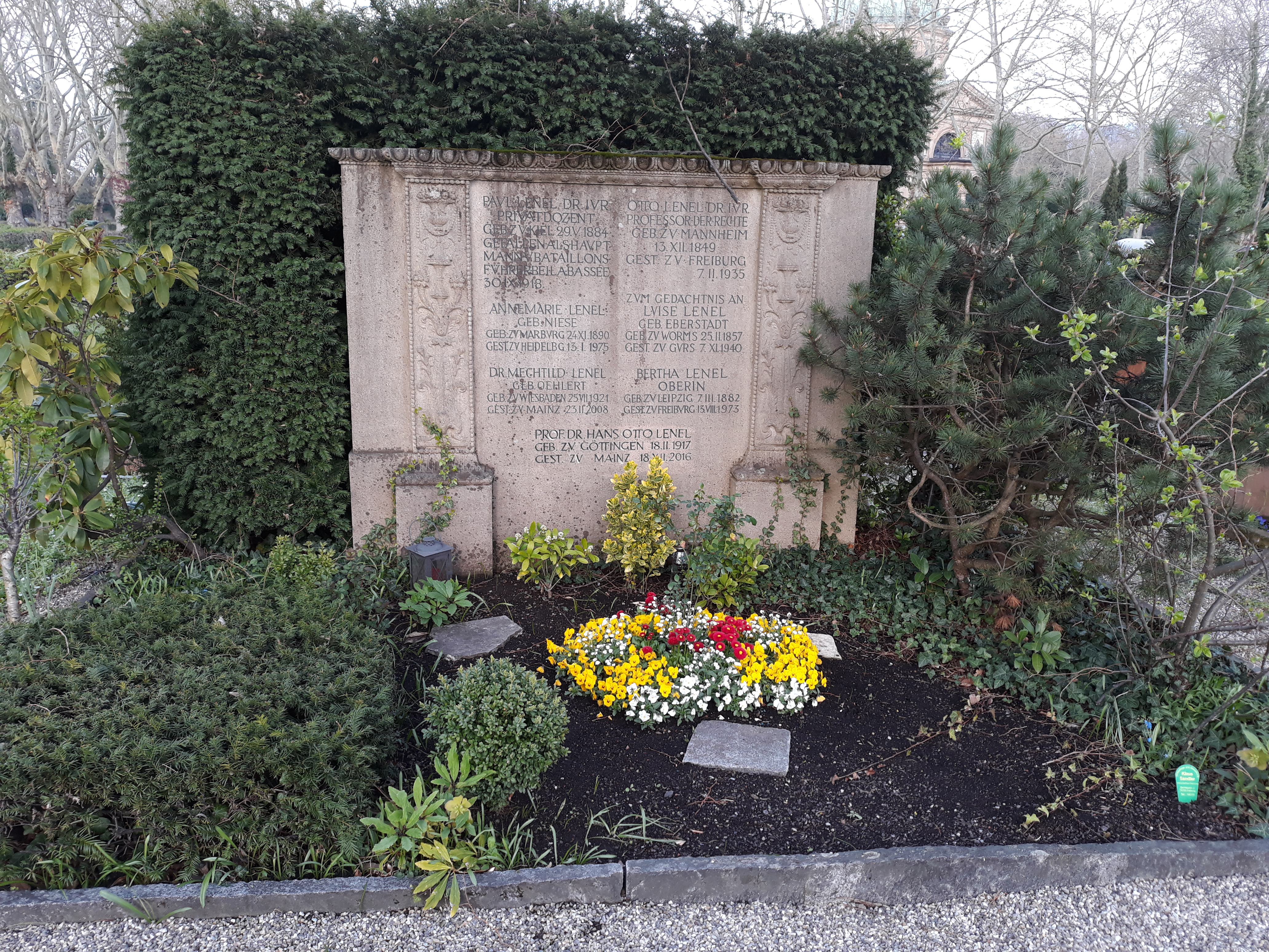 Das Grab des deutschen Volkswirts Hans-Otto Lenel im Familiengrab Lenel auf dem Hauptfriedhof Freiburg.